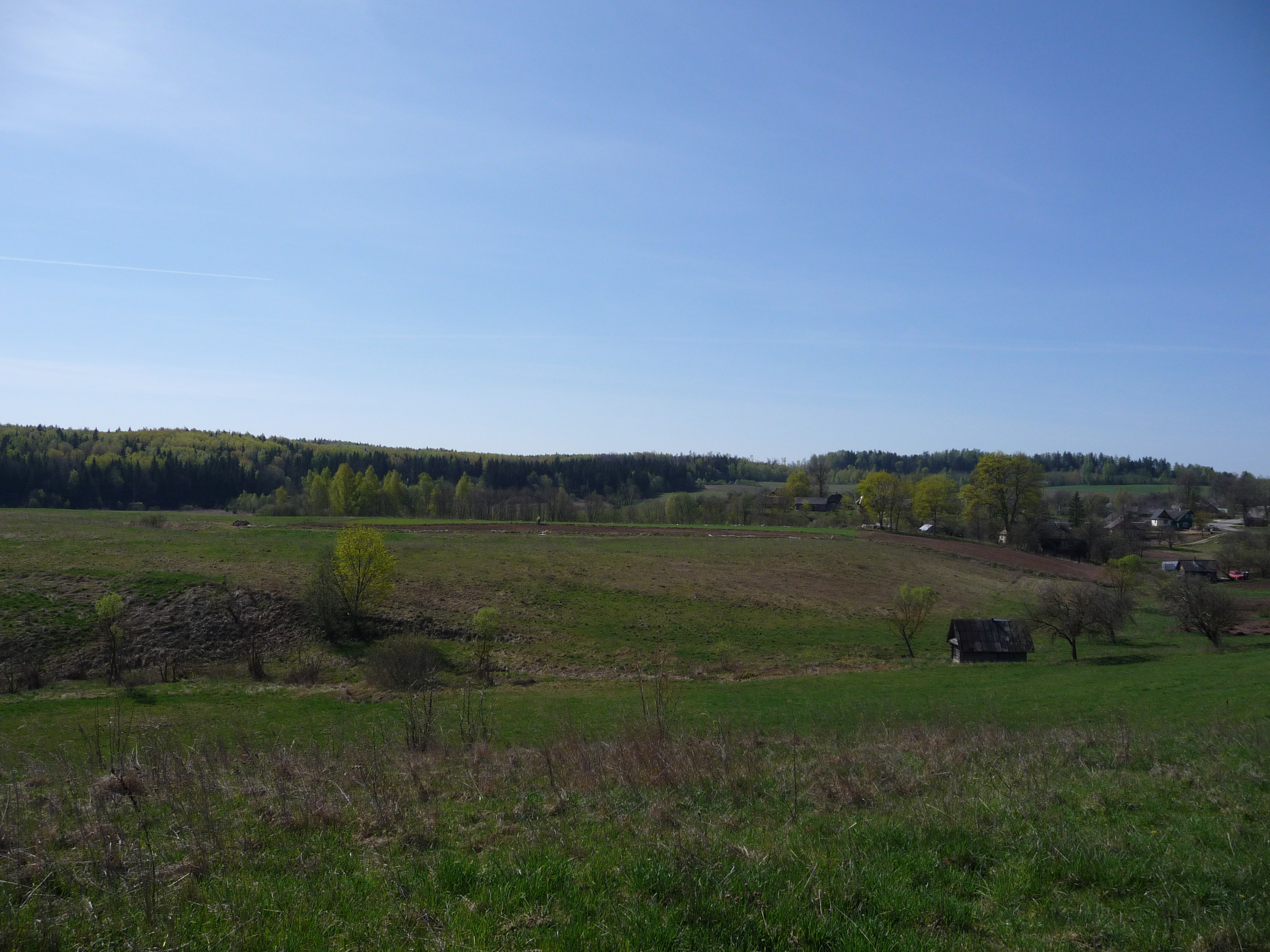 Senasis Daugėliškis, Ignalinos raj. Manoma, kad čia stovėjo Daugėliškio bažnyčia